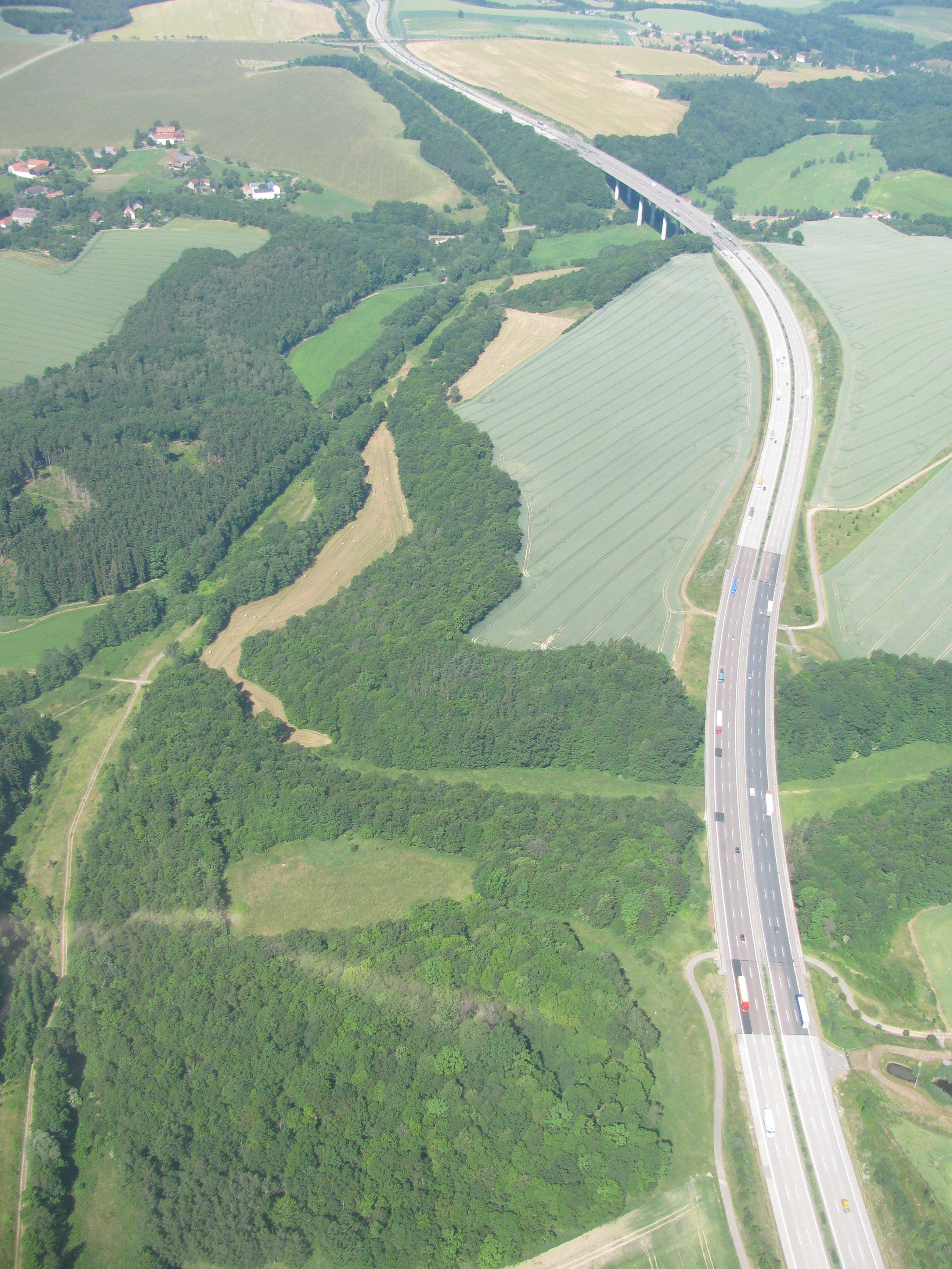 Tanneberger Loch Luftbild